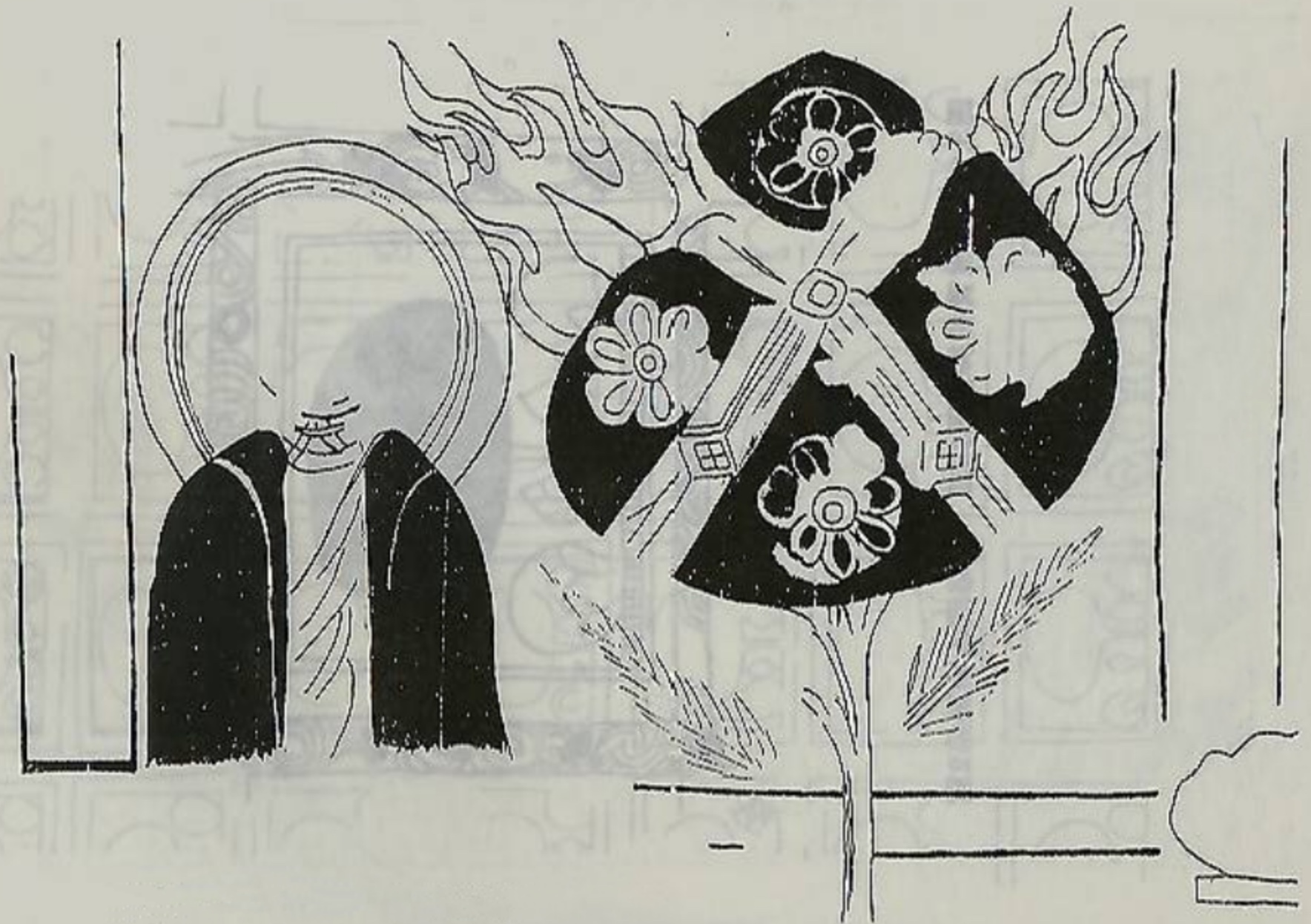 行者觀想圖，吐峪溝中區第7窟：這些窟中有衆多的壁畫是讚誦光明王國的繁榮昌盛景象，該圖即是一例，其中最多的是常榮寶樹，寶樹生長於七寶香池之中，池中充滿活命水，寶樹枝葉繁茂，香花盛開，果實累累，結出金銀、珍珠、寶石，各色珍寶，光燄四射。各種寶樹旣可代表眞實樹木，也可代表光明王國、摩尼、耶穌、明尊的使徒。信徒禮拜讚誦這些寶樹，食用這些寶果，可以長生不老，脫離苦海。這些形像和情景，在摩尼教寫本中都有依據。